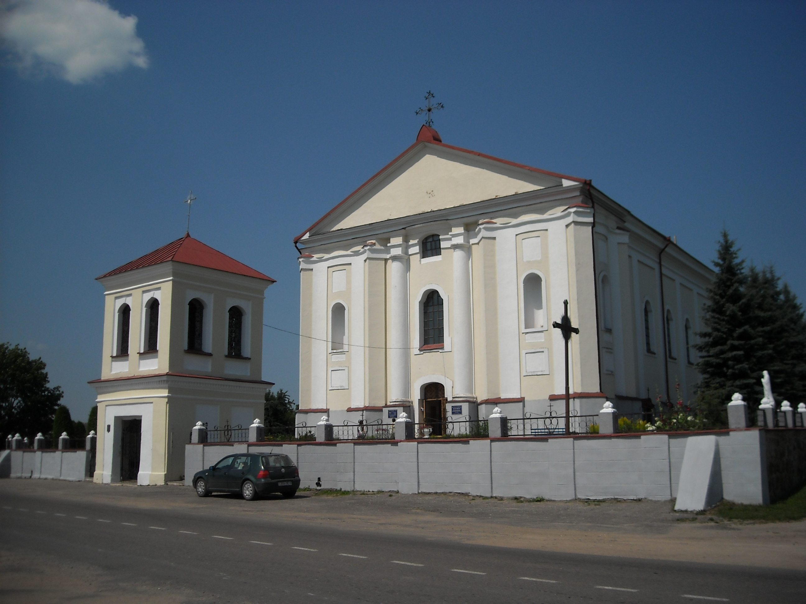 Беларуская (тарашкевіца): Касьцёл Беззаганага Зачацьця Найсьвяцейшай Панны Марыі. в. Удзела This is a photo of Belarusian heritage monument. Reference number: 212Г000417 ( WLM)